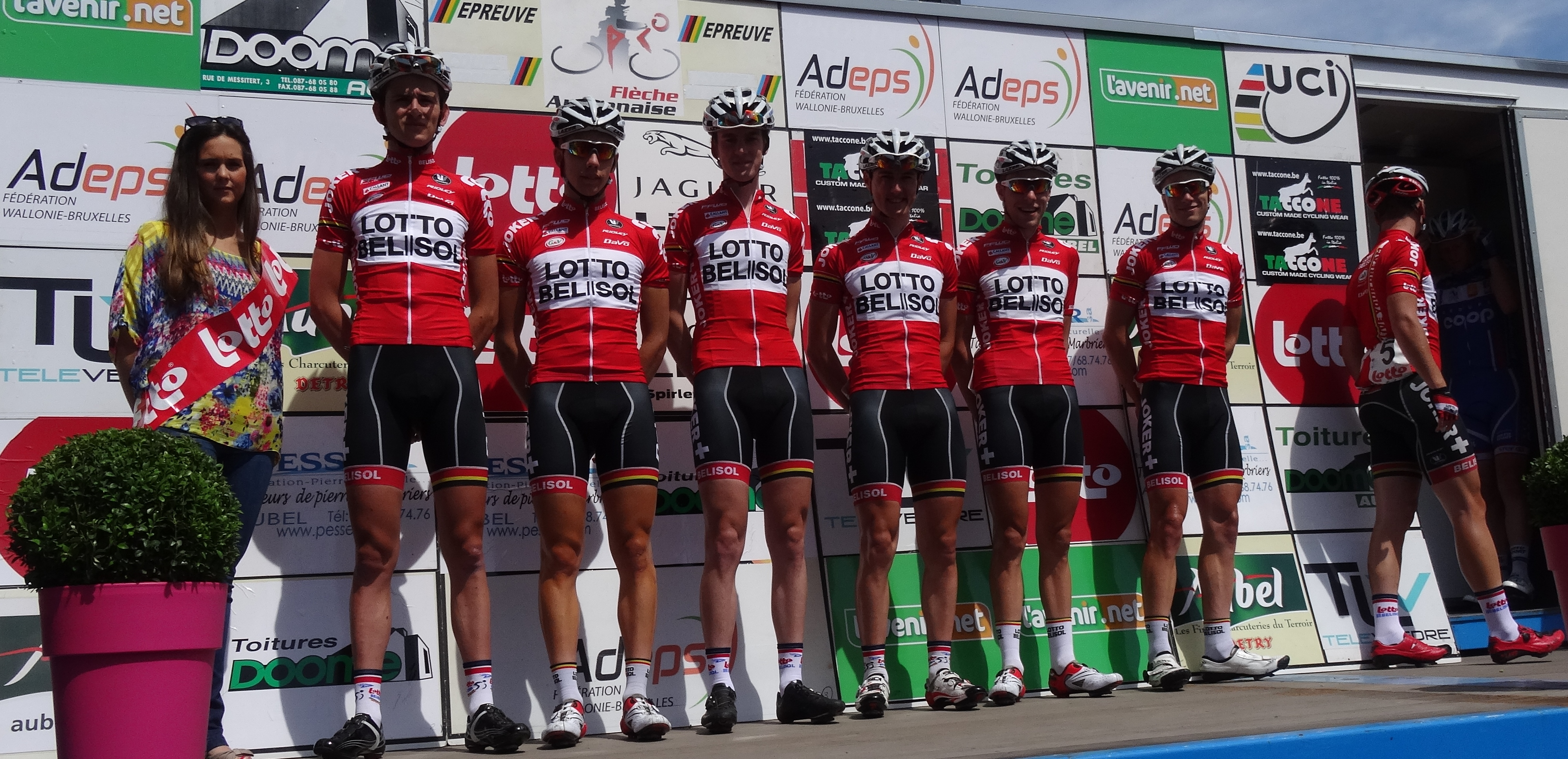 Reportage photographique réalisé le dimanche 22 juin à l'occasion du départ et de l'arrivée de la Flèche ardennaise 2014 à Herve, Belgique.